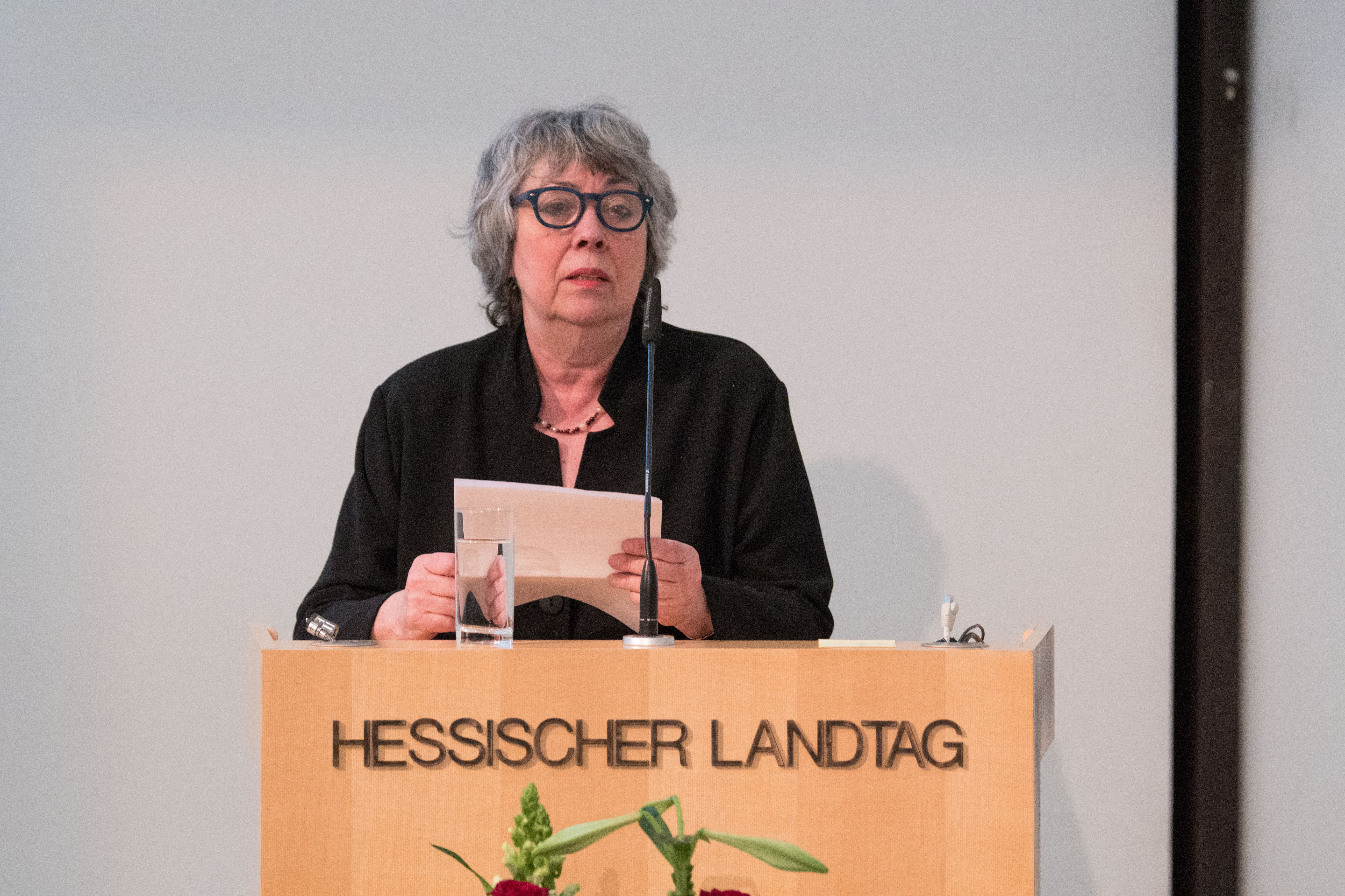 Gedenkveranstaltung für die Opfer des Nationalsozialismus, Hess. Landtag, 29.01.2018Copyright by Stefan Krutsch Photographie60389 Frankfurt am Main